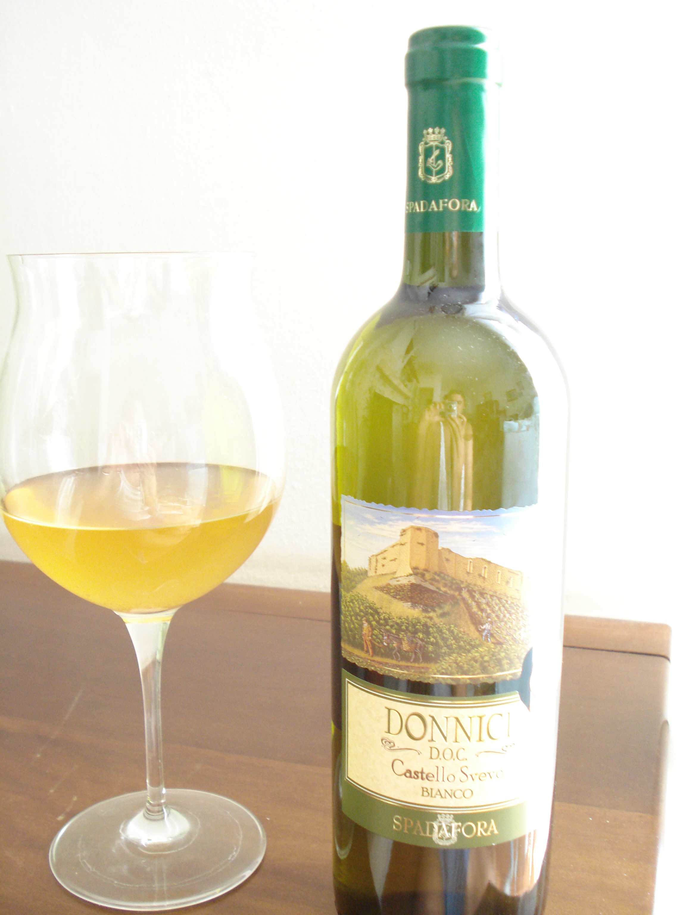 UNA BOTTIGLIA DI VINO DONNICI DOC BIANCO CASTELLO SVEVO PRODOTTO A DONNICI FRAZIONE DI COSENZA